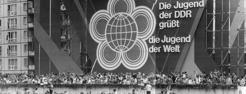 Berlin, 10. Weltfestspiel, Demonstration, Ehrentribüne ADN-ZB Sturm 4.8.73 Berlin:Festival-Demonstration-Vor den Augen der Weltjugend legte am 4.8.73 die junge Generation der DDR ein machtvolles Bekenntnis zu ihrem sozialistischen Vaterland ab.Zehntausende Mitglieder der FDJ verienten sich zur Demonstration "Die Jugend der DDR grüßt die Jugend der Welt".Blick auf die Ehrentribüne-Zweiteiliges Panorama.